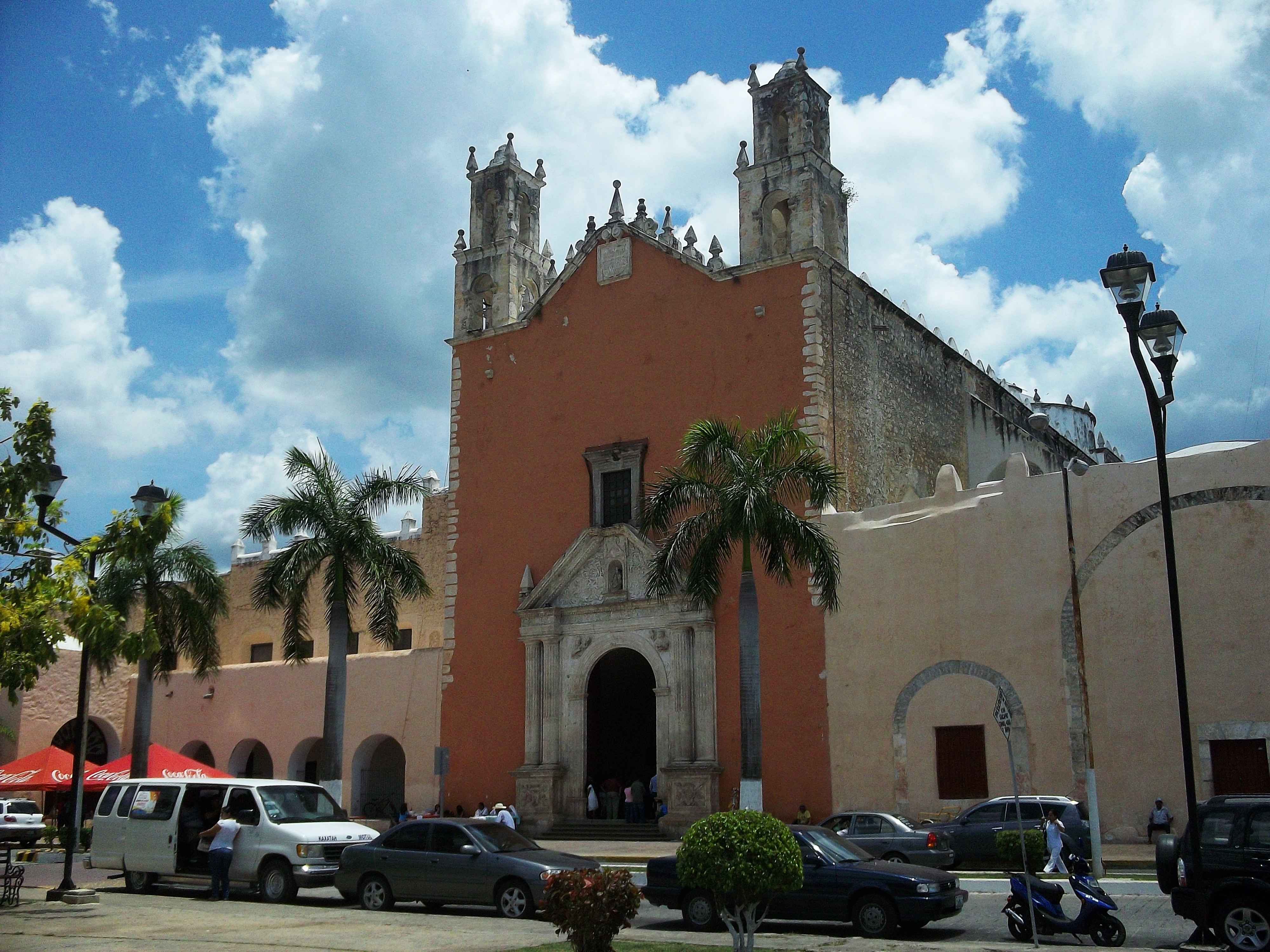 Ilgesia de Motul, Yucatán.